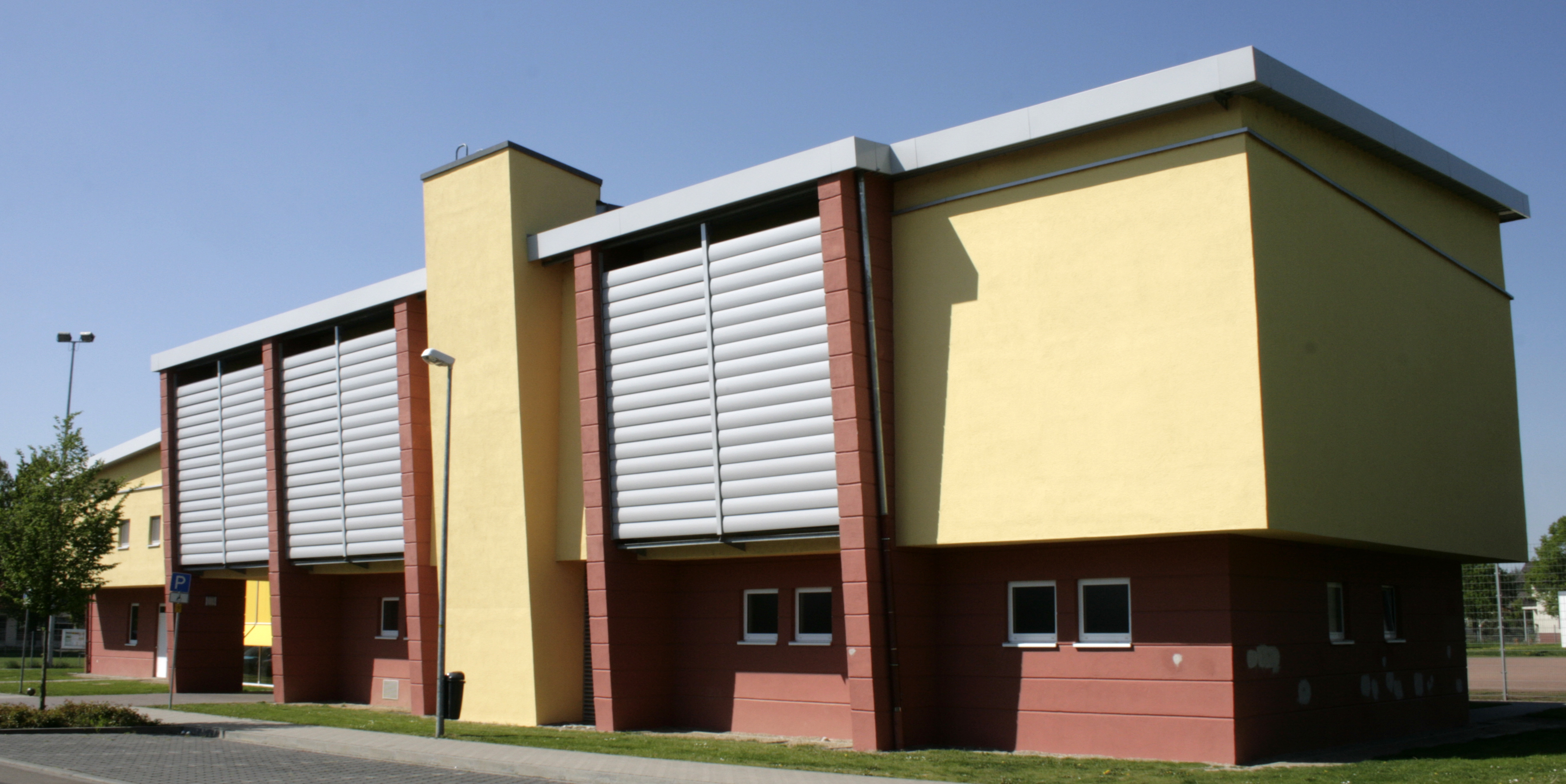 Gemeinschaftshaus in Linter, Deutschland